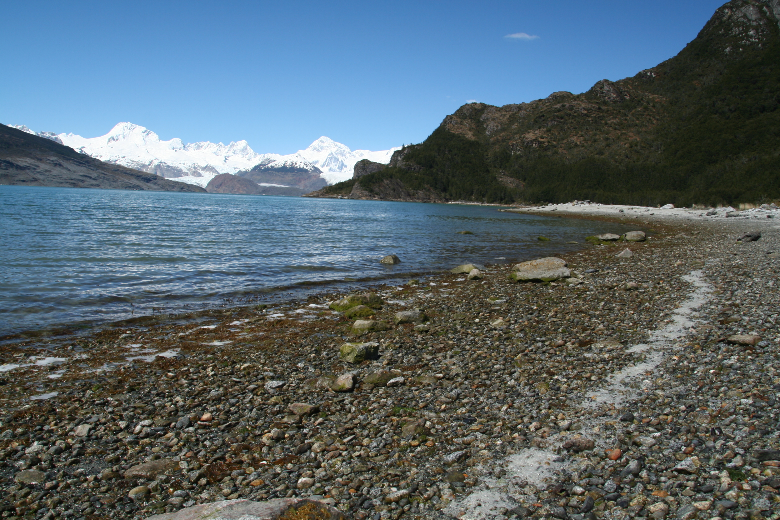 Marinelli Glacier, Cordillera Darwin, Chile.